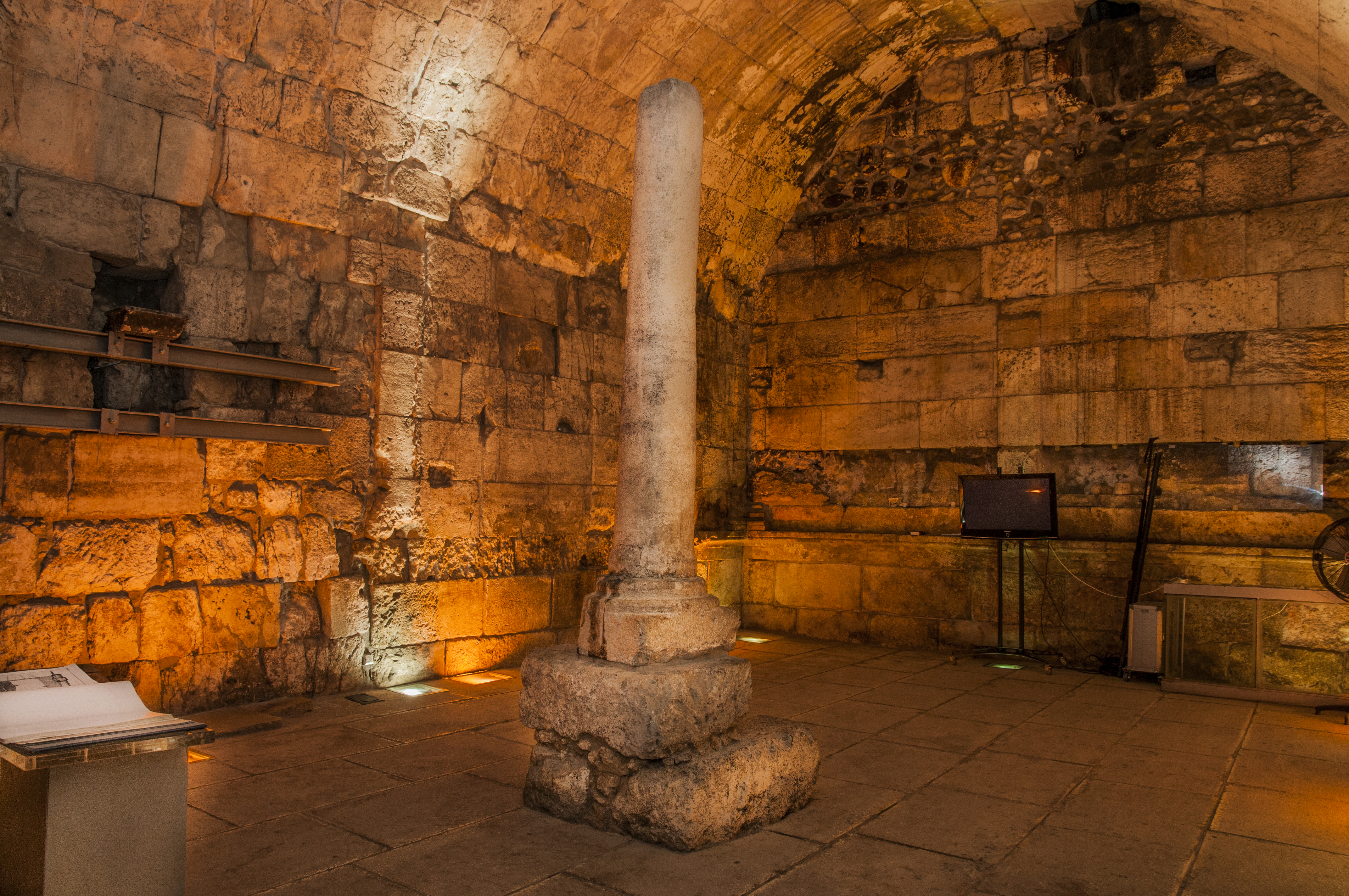 מנהרות הכותל הן מערך חללים ומחילות תת-קרקעיות מתקופות שונות לאורך תוואי הכותל המערבי, מתחת לבתי הרובע המוסלמי בעיר העתיקה בירושלים. במתחם מבנים מתקופת בית שני, מימי הביניים ומהעת החדשה. ציר הליכה אופקי מחבר את החללים והמחילות, מעניק למבקר חוויה של מסע לאורך ציר הזמן ההיסטורי, ונחשב לאחד מאתרי התיירות הפופולריים בישראל.